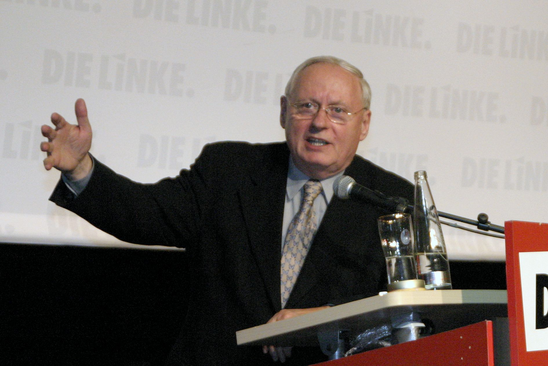 Oskar Lafontaine,deutscher Politiker und Publizist, Wahlkampfveranstaltung der Partei DIE LINKE in der Münchner Freiheizhalle am 16.02.2008